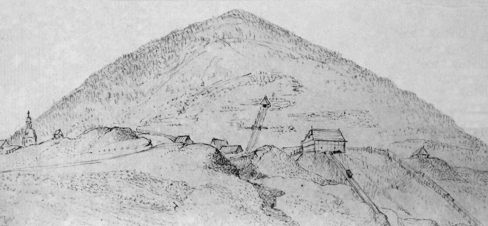 Handzeichnung des Rammelsbergs von Georg Melchior Kraus für J. W. v. Goethe.